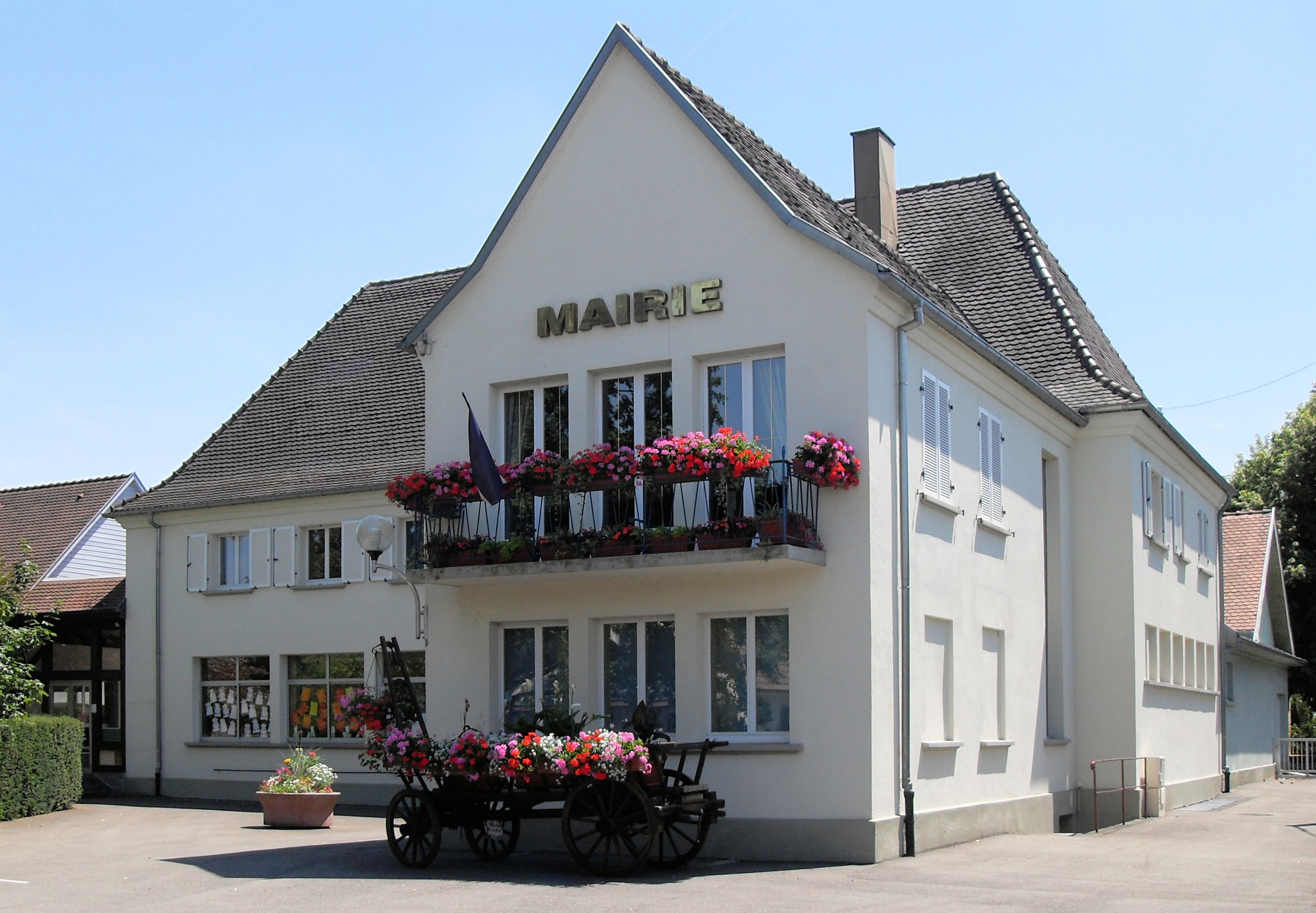 La mairie d'Algolsheim